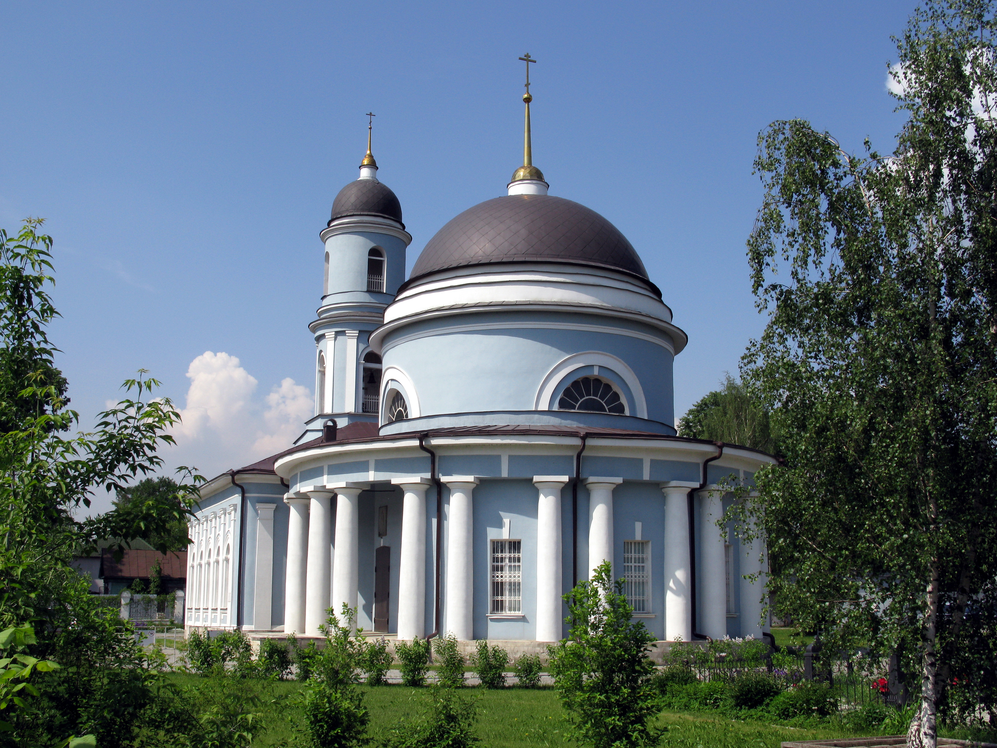 Храм Покрова Пресвятой Богородицы в селе Пехра-Покровское Балашихинского района Московской области.